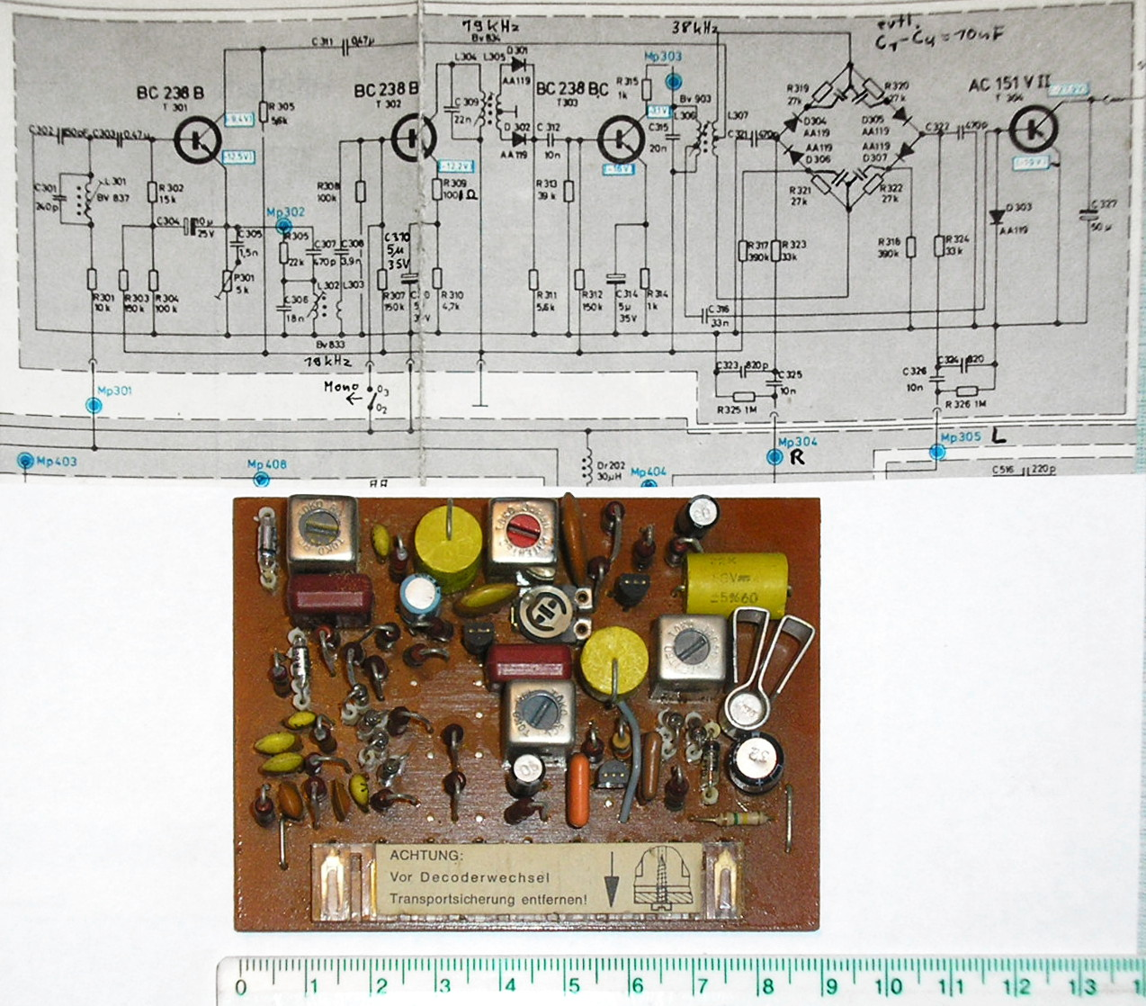 Stereodecoder-Platine mit diskreten Bauelementen (Telefunken, 1971)